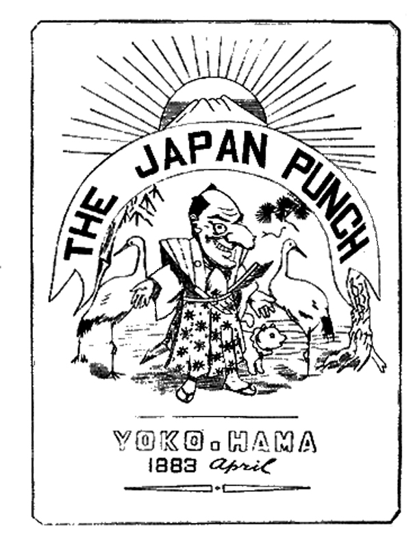 Couverture d'avril 1883 de Japan Punch